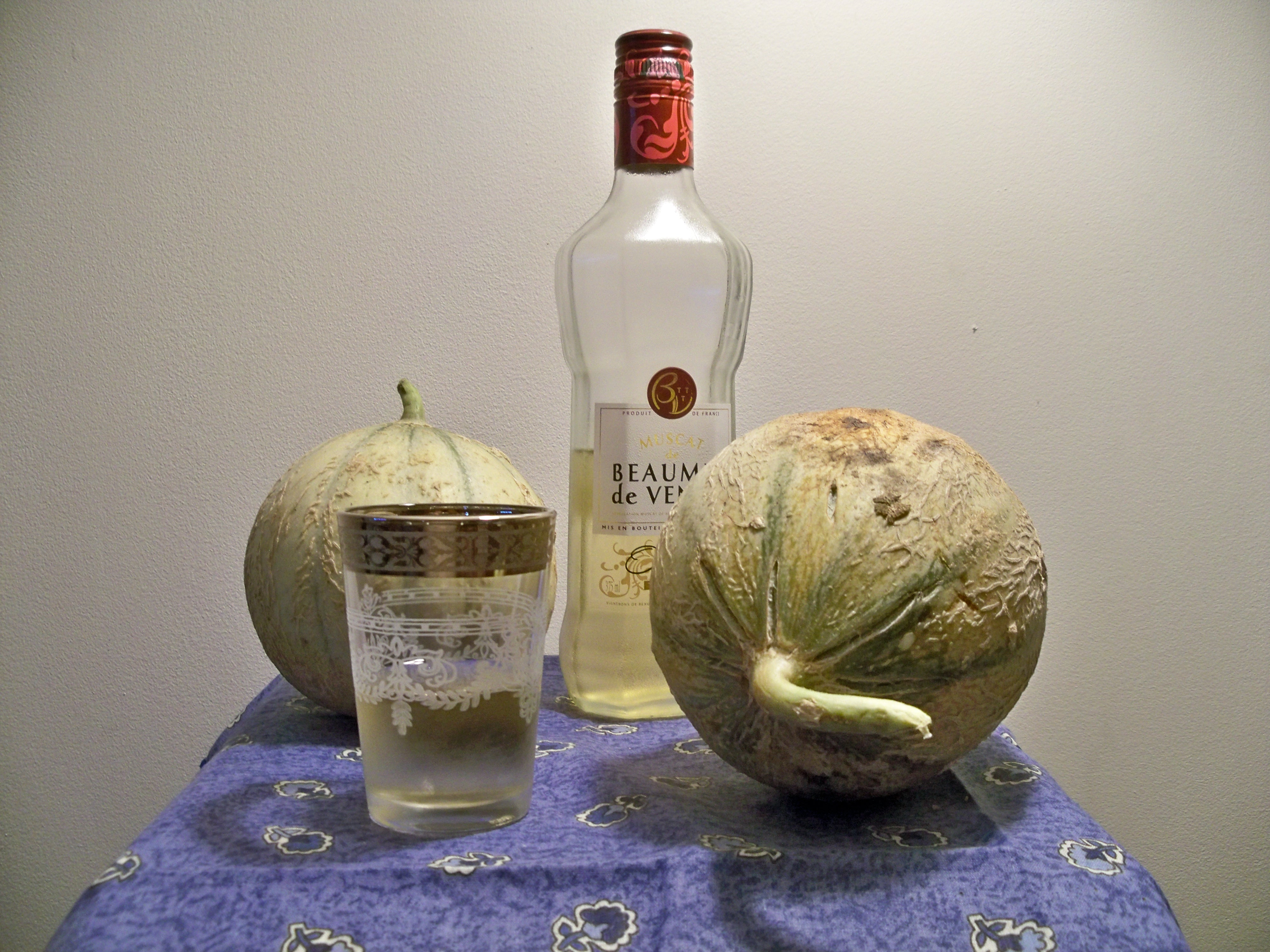 Melon et Beaumes de Venise (Vaucluse)